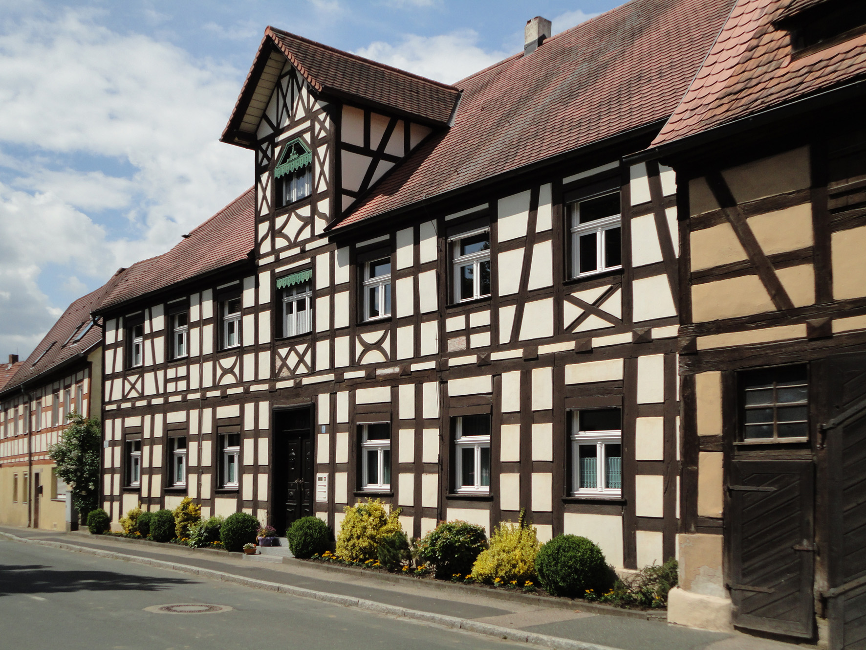 Fachwerkhaus Neustädter Str. 13This is a photograph of an architectural monument.